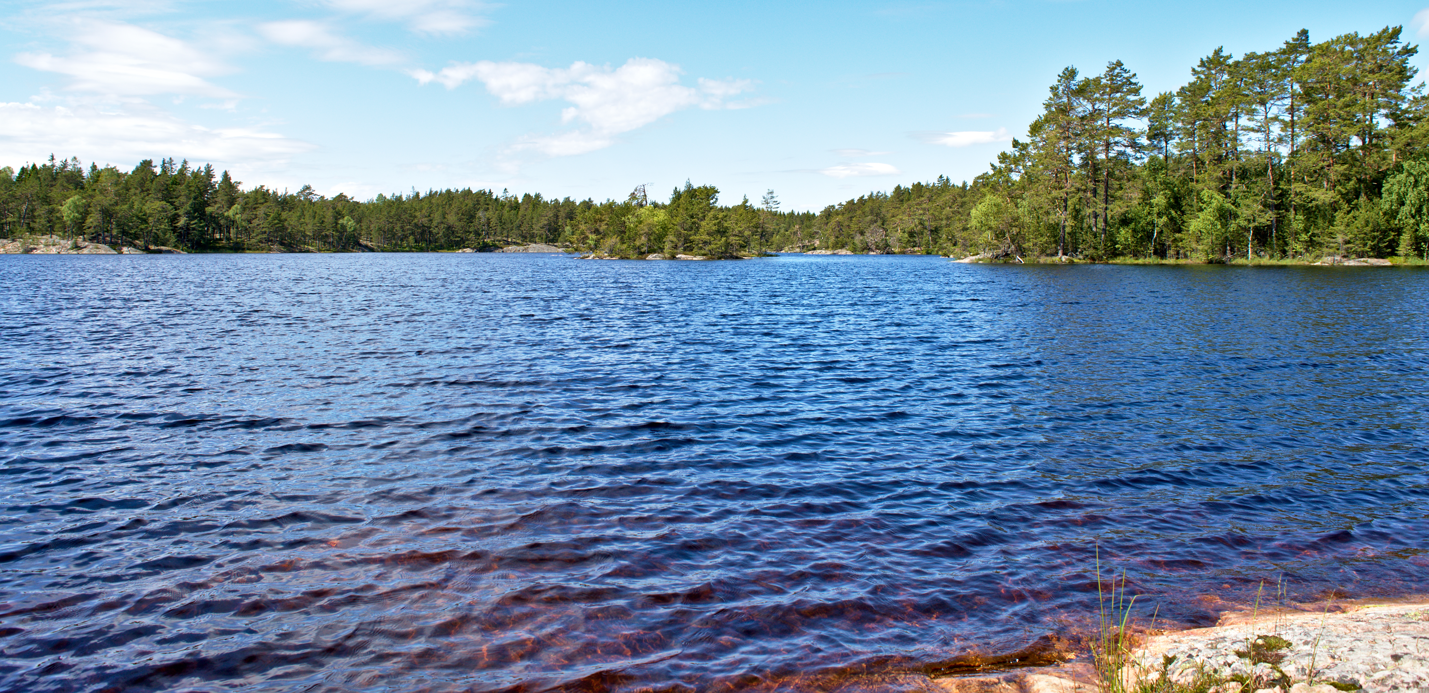 Sjön Vitträsk på Ornö i Stockholms skärgård. Sett från öster.